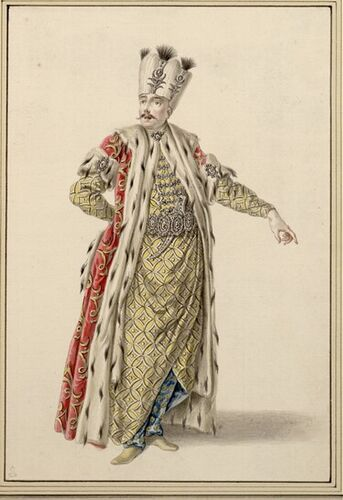 Vestiario del Solimano Opera 1. Der Tenor Angelo Amorevoli als Solimano 24-teiliger Zyklus (inklusive Titelblatt) Zeichnung / Feder in Grau und Braun, Graulavierungen, aquarelliert